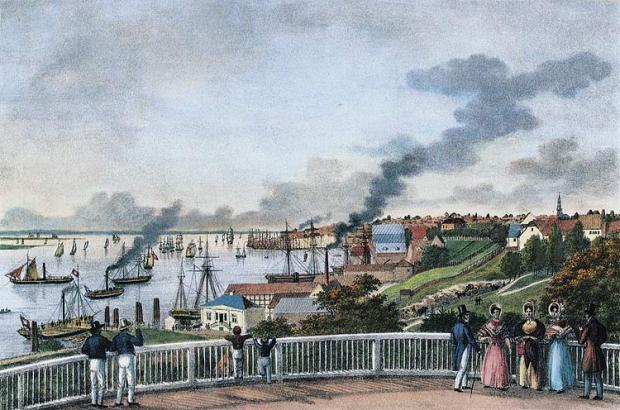 Aussicht von der Elbhöhe auf dem Walle (Stintfang) über Elbe, Vorstadt St. Pauli/Hamburgerberg nach Altona